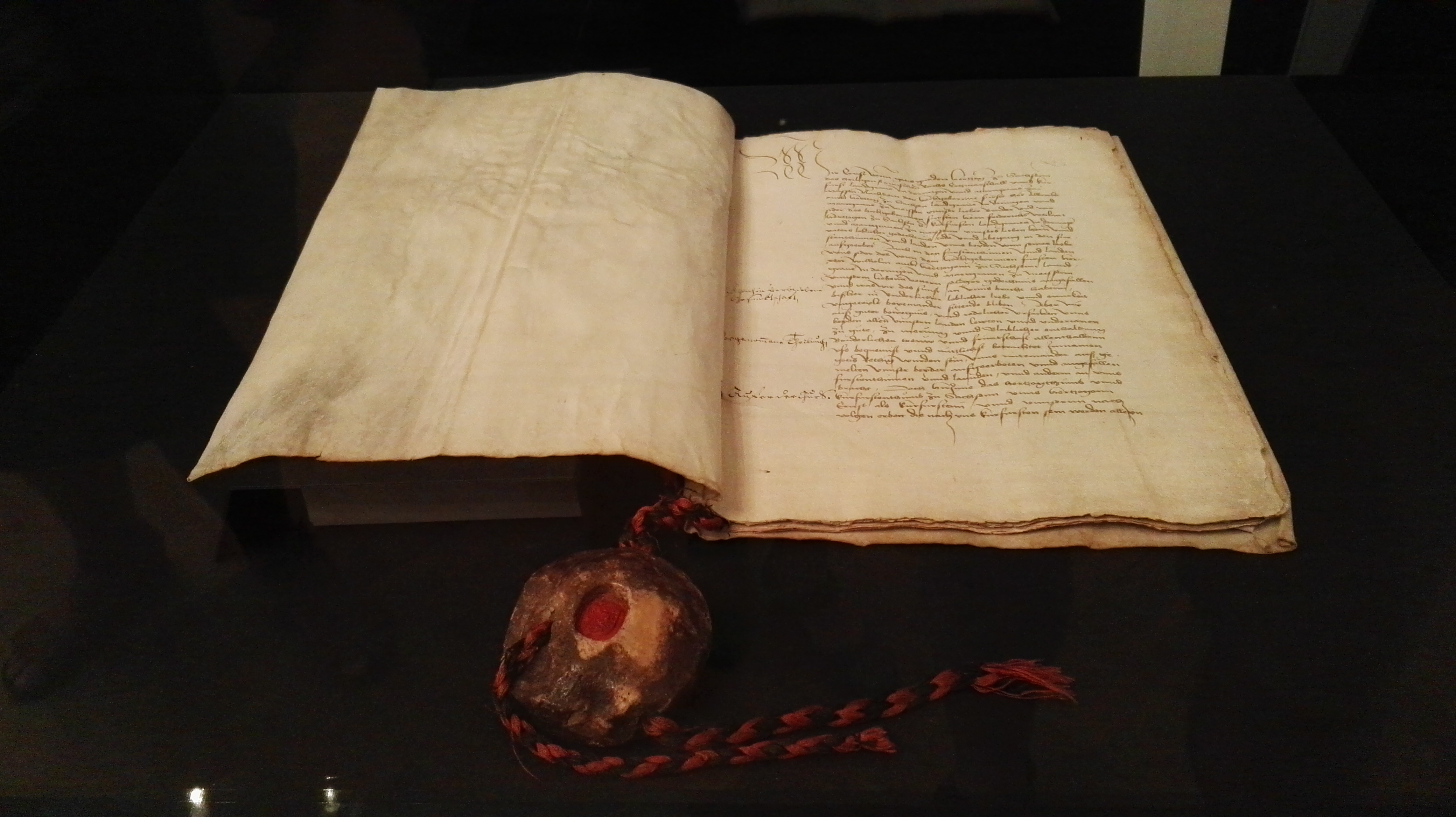 Rezess der Leipziger Teilung, Thüringer Staatsarchiv ausgestellt im Schloss Friedensstein in Gotha